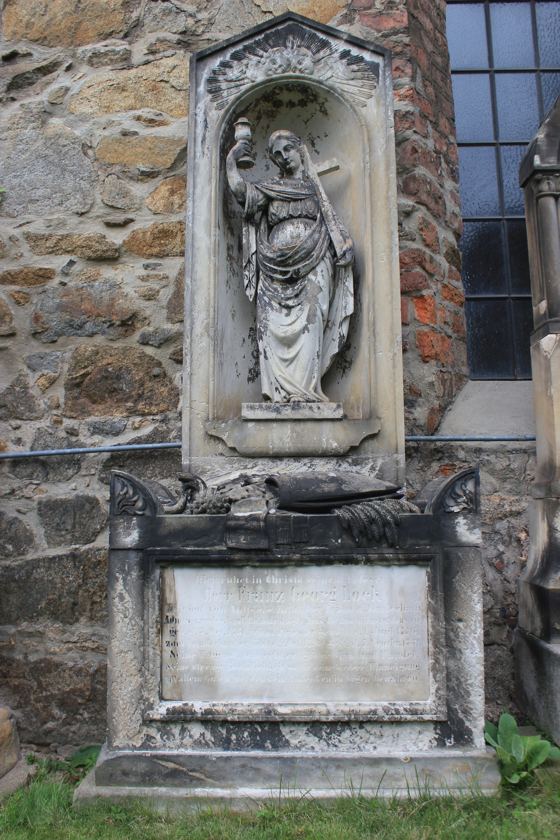 Hornjoserbsce: Row Franca Jurja Loka na Budyskim Mikławšku.